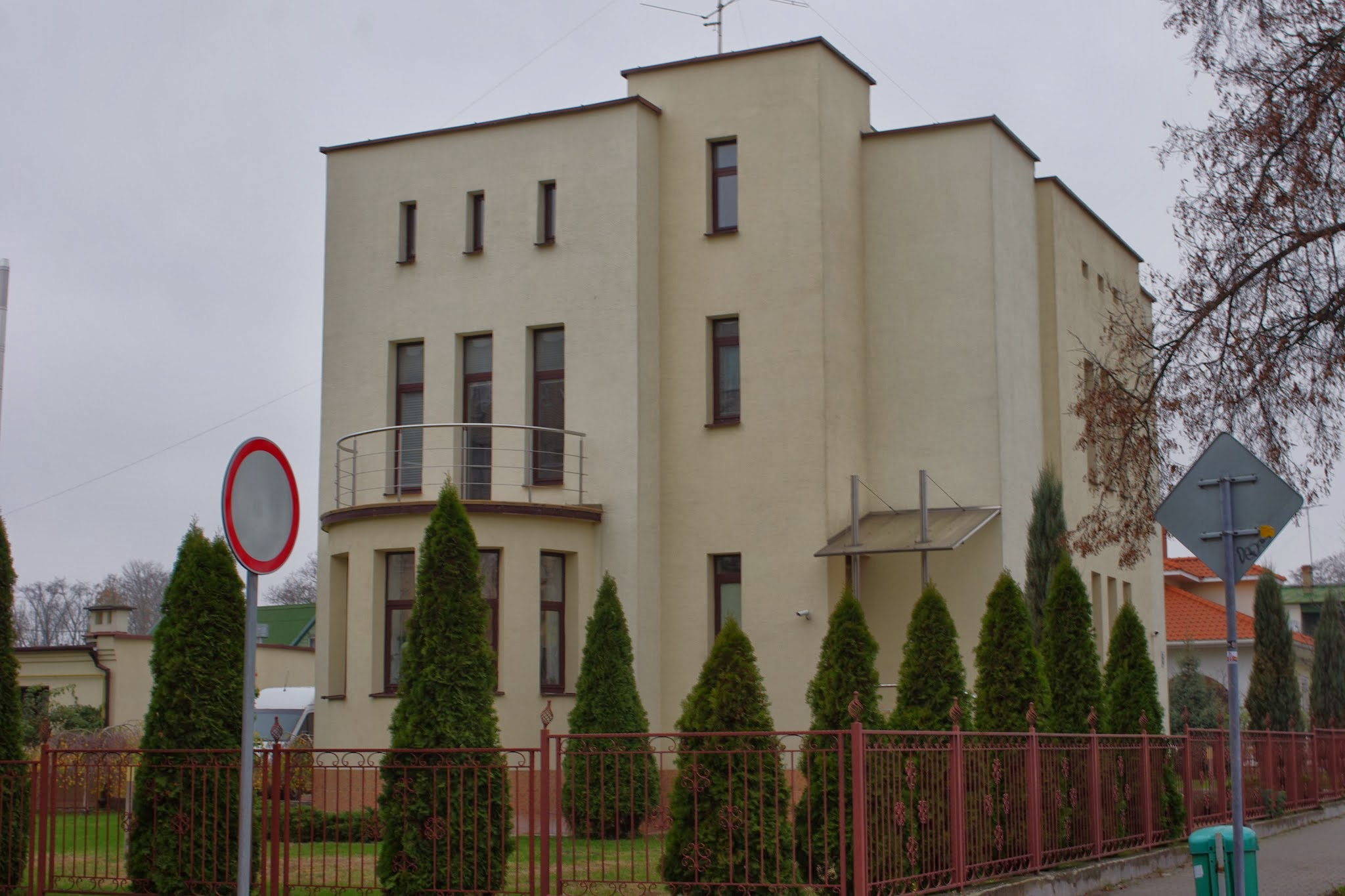 Lieninski rajon, Brest, Belarus